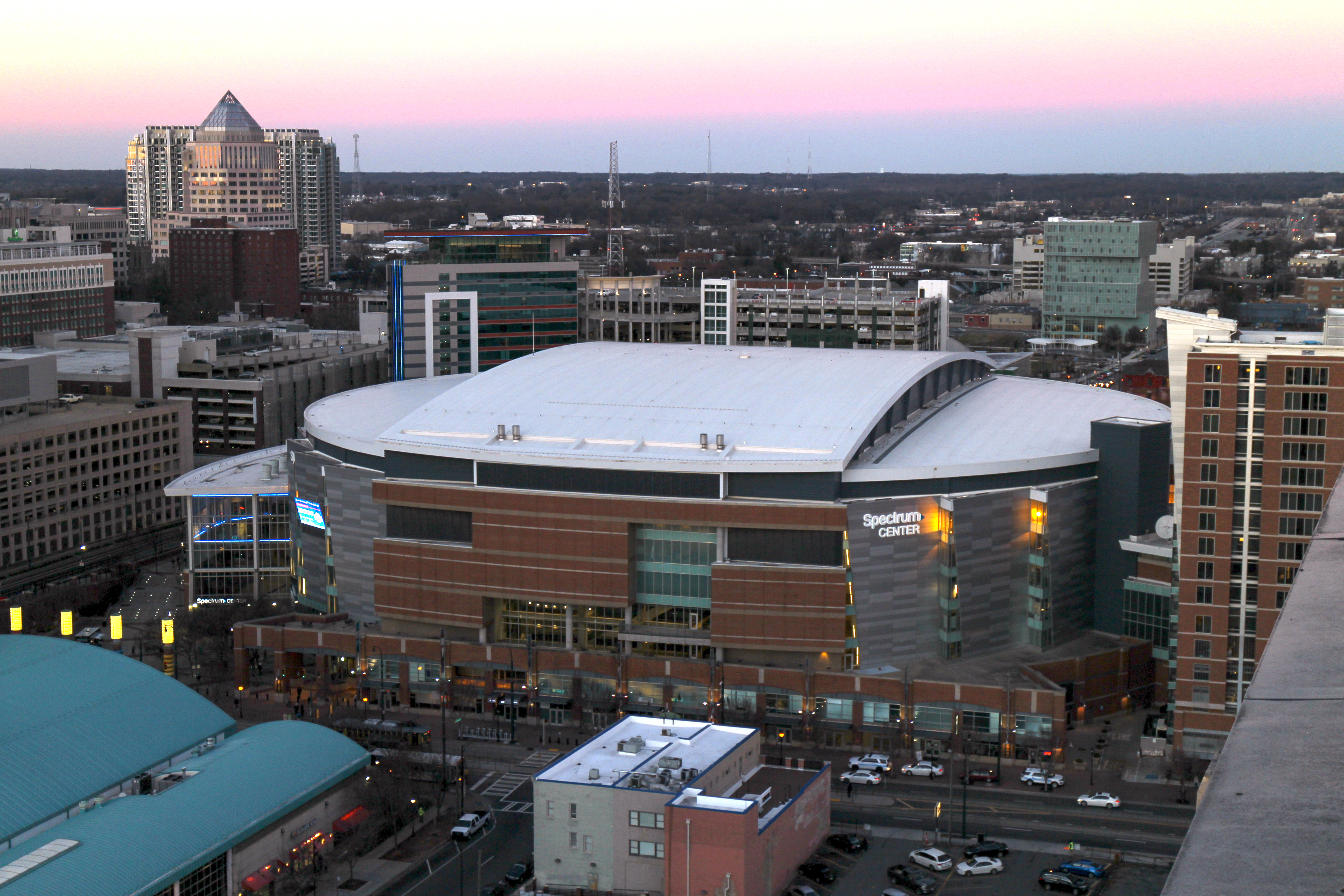 View from Farenheit Restaurant